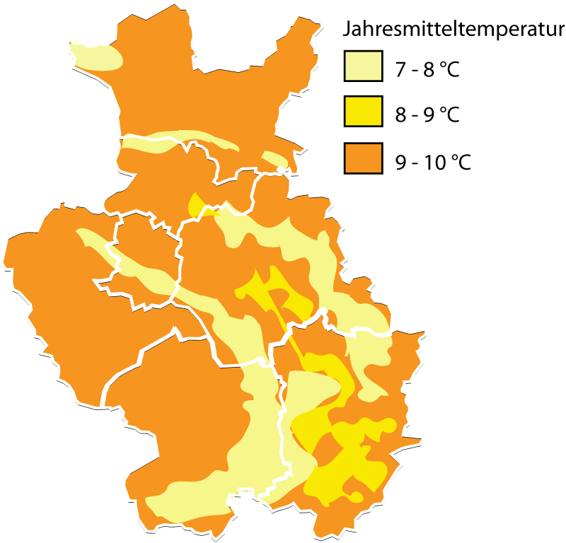 Map of temperature in Ostwestfalen-Lippe